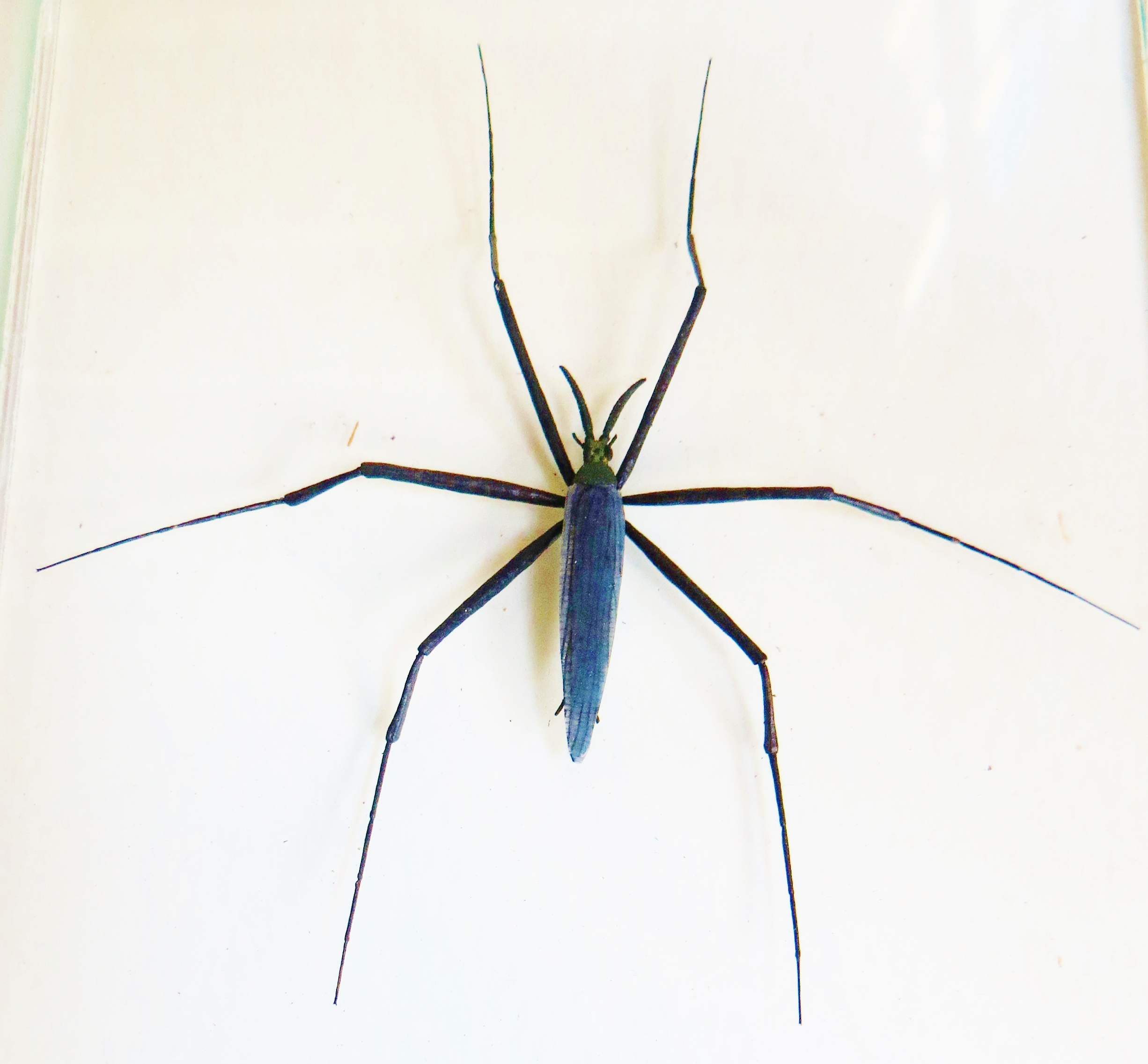 Restoration of Chresmoda, an extinct insect - Took the picture at Teylers Museum, Haarlem